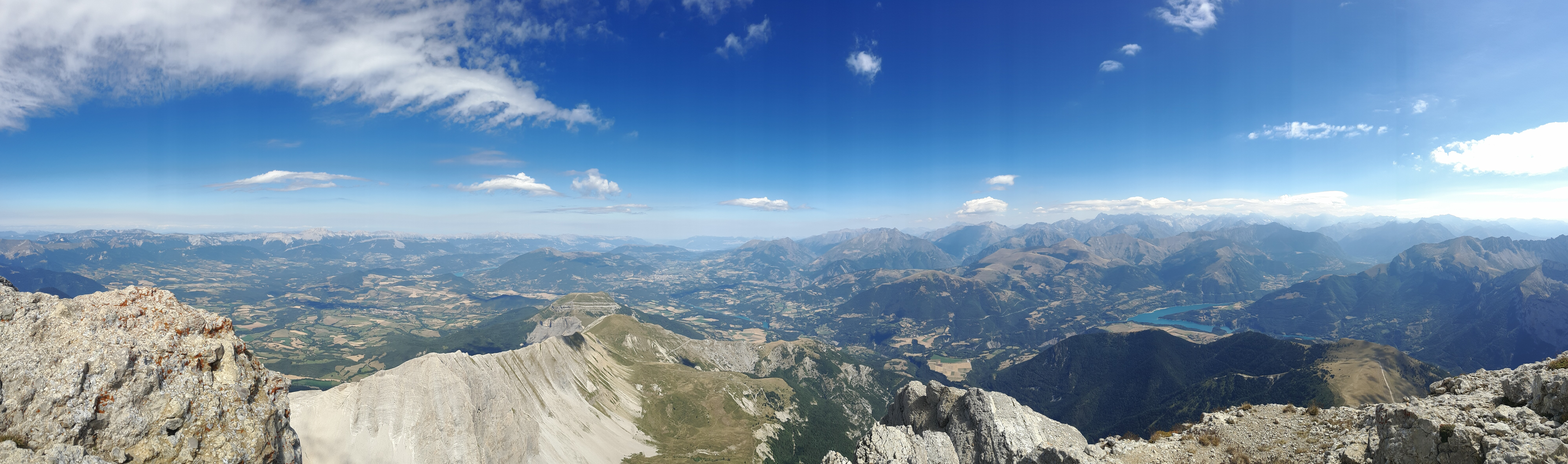 On y voit, à l'arrière plan, de l'ouest vers l'est, les massifs du Vercors, de la Chartreuse et des Écrins.